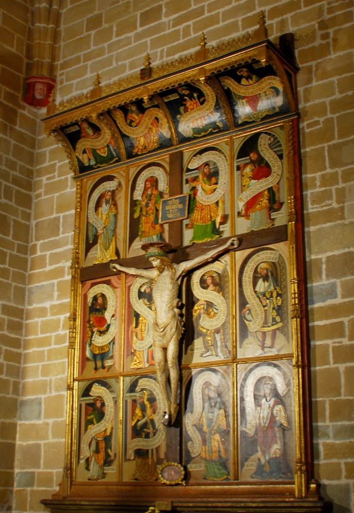 Retablo del Cristo de Caparroso en la catedral de Pamplona